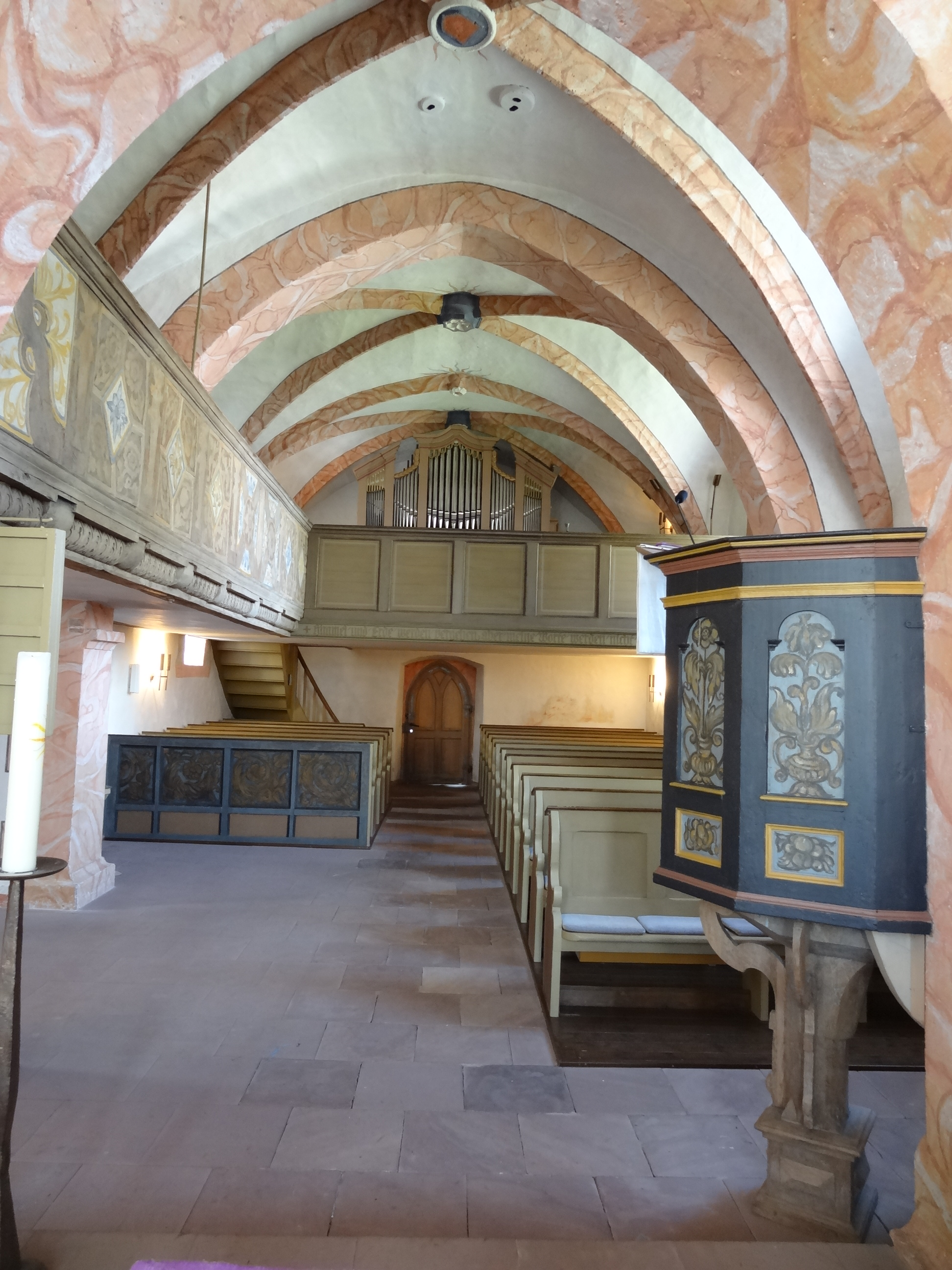 Evangelische Kirche Ober-Bessingen